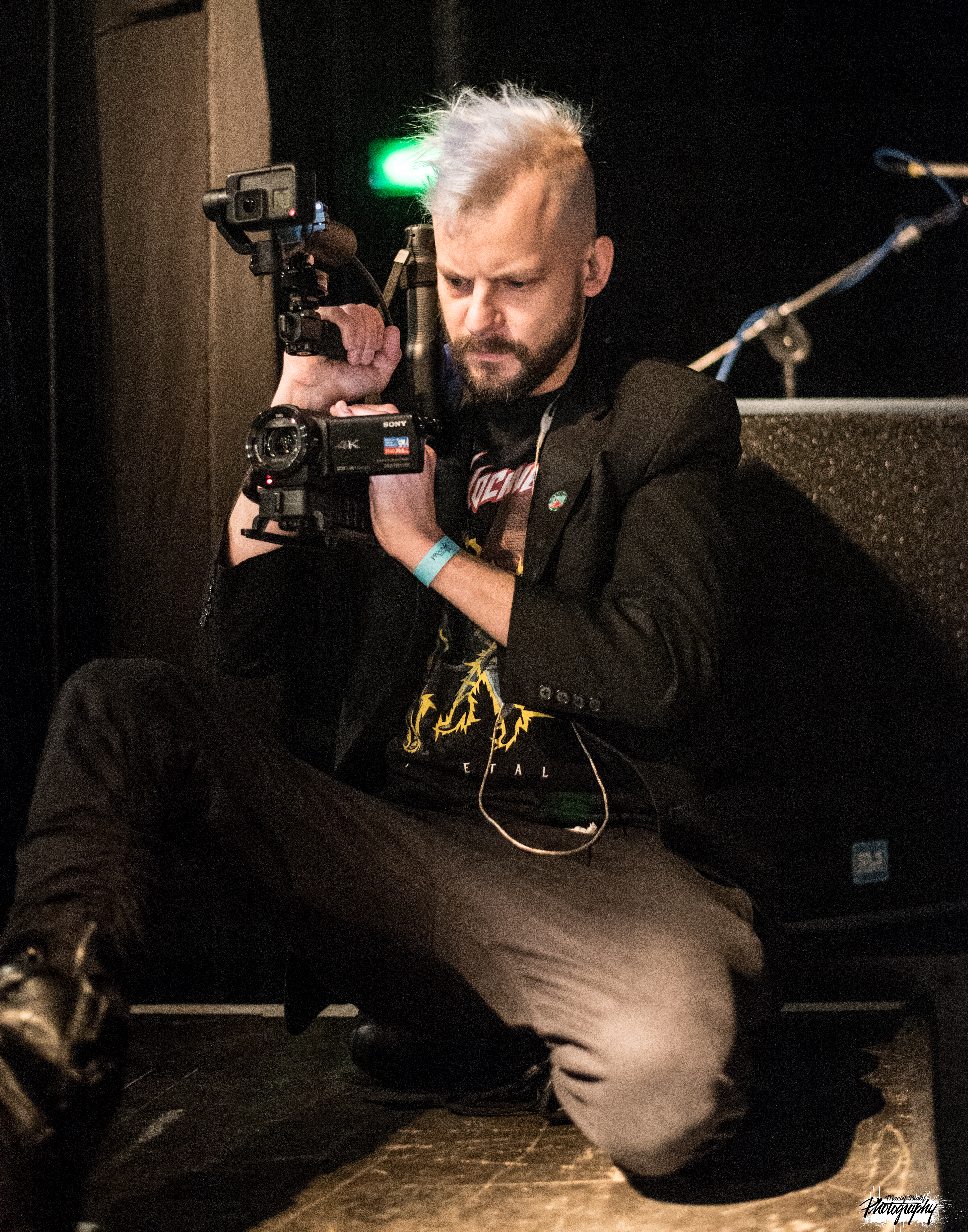 Mikołaj "Jaok" Janusz jako prezenter audycji w Rock Radiu